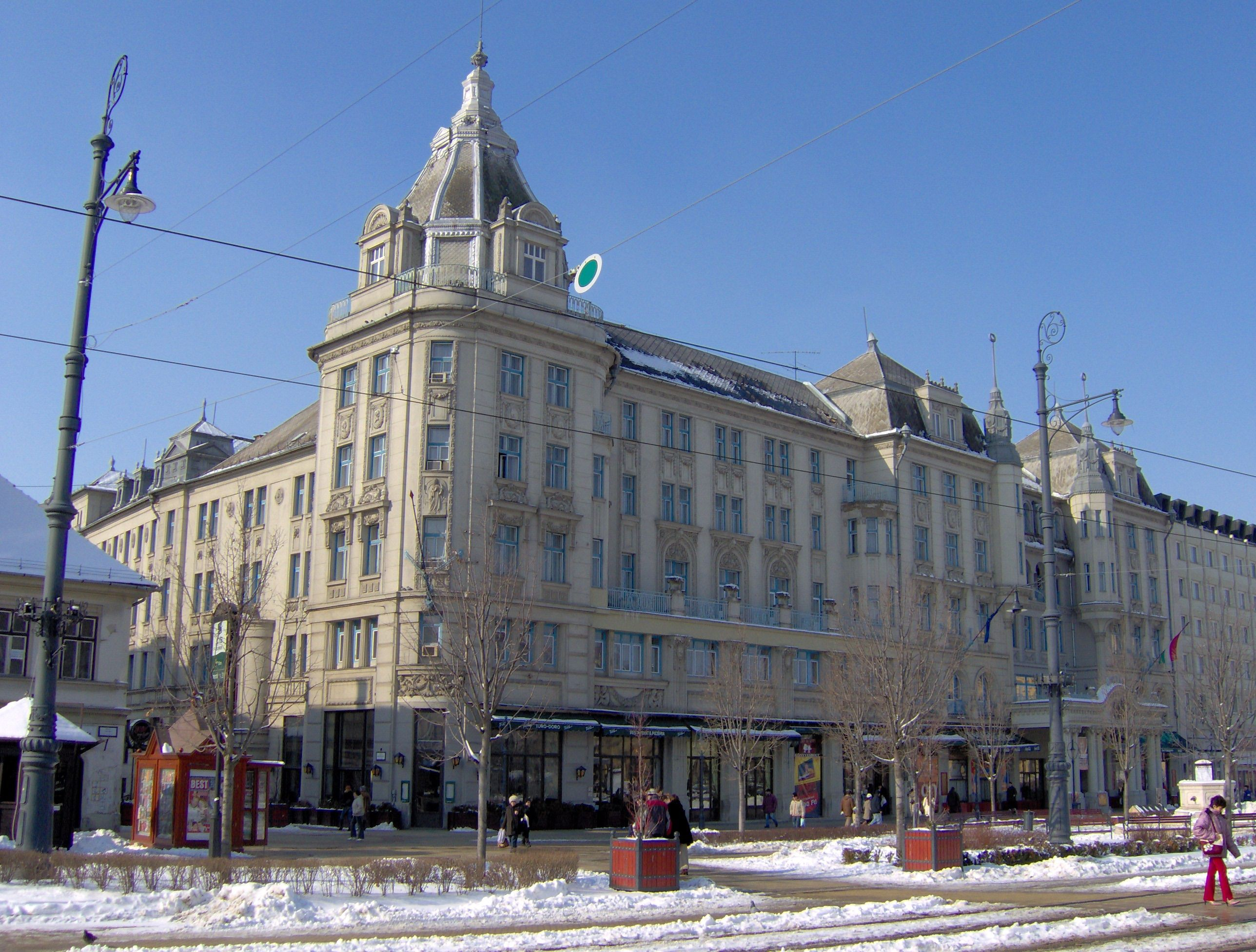 Arany Bika Szálló (Golden Bull Hotel), Debrecen